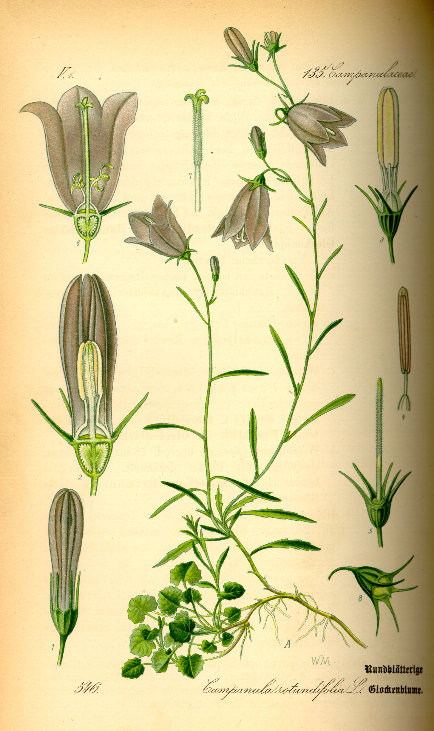 Campanula rotundifolia from Flora von Deutschland Österreich und der Schweiz, Gera 1885